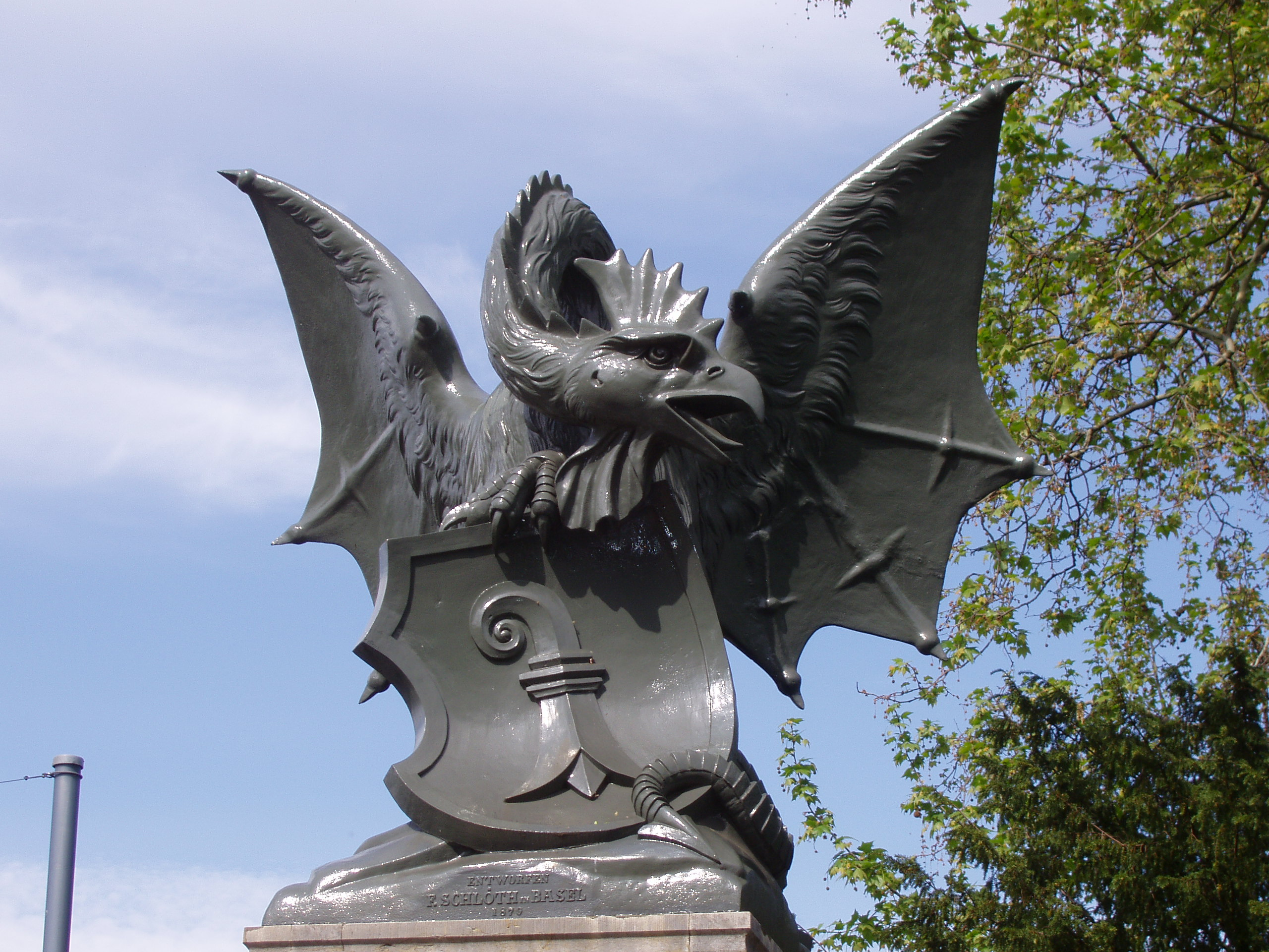 Basilisk am Brückenkopf der Wettsteinbrücke in Basel. Die vier Basilisken wurden von Ferdinand Schlöth entworfen. Die Gussformen stammten von Hans Baur